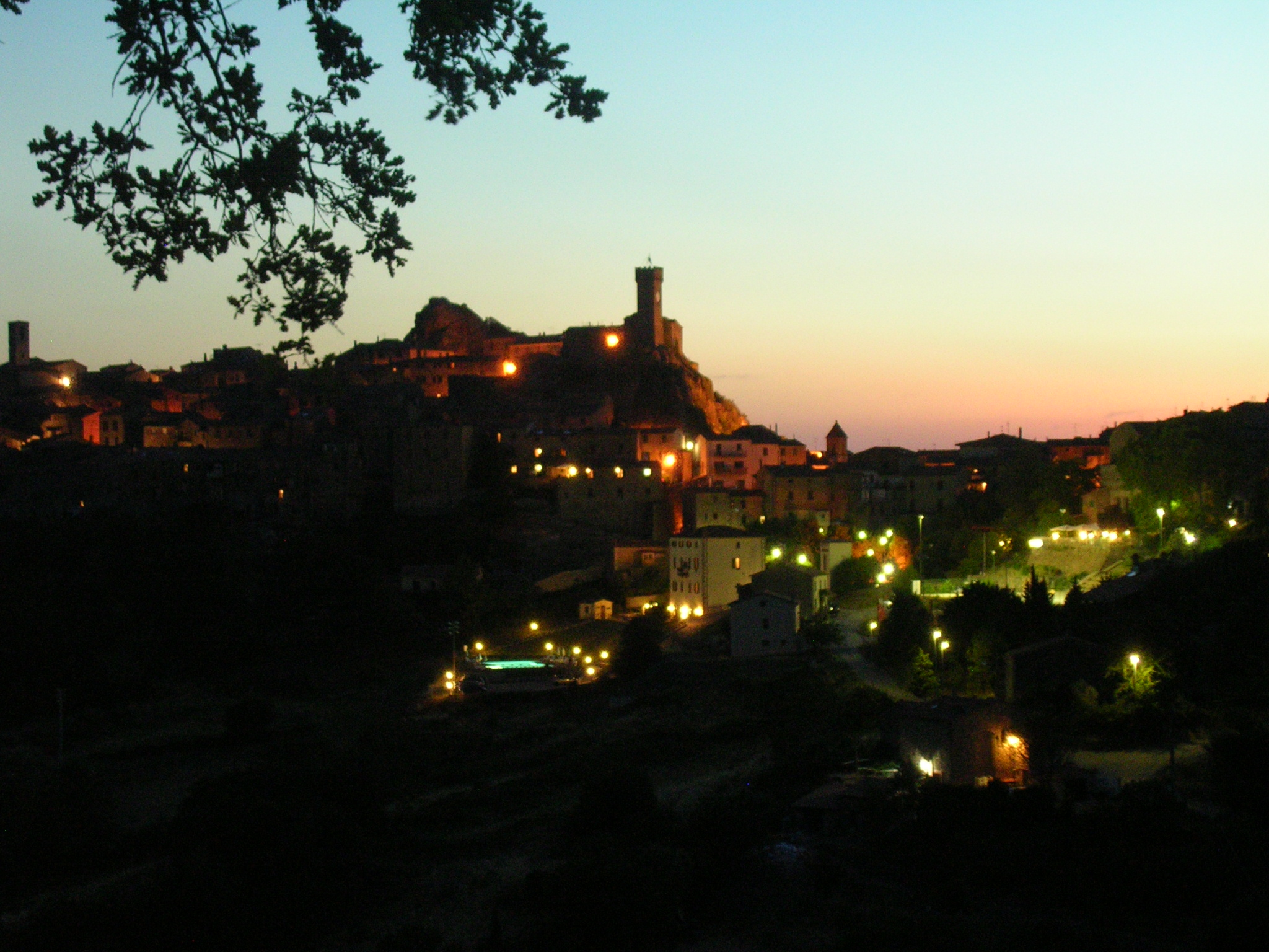 il paese di Roccatederighi in una sera di luglio 2006